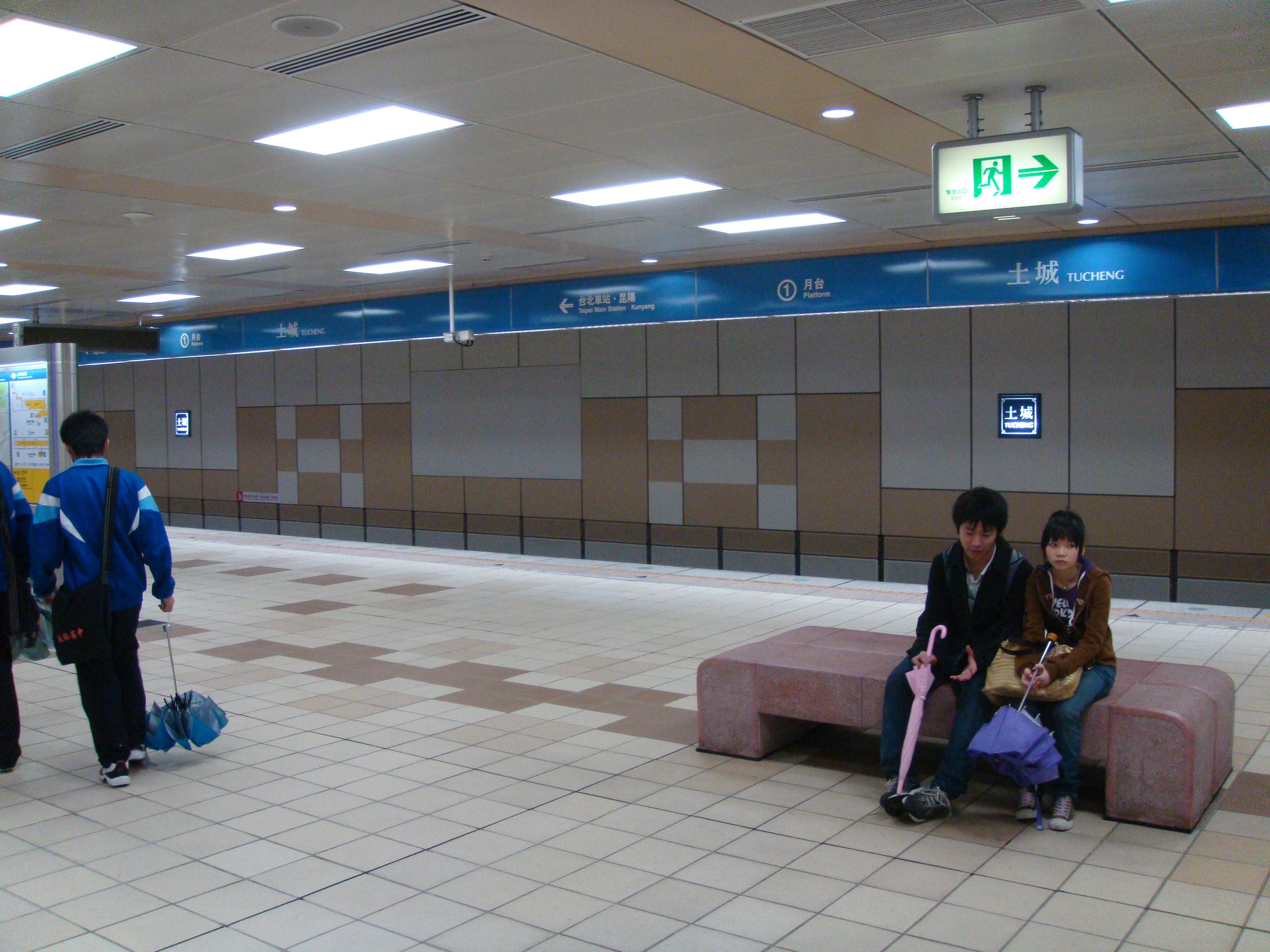 Tucheng Station, Tucheng Line, Taipei Metro, Taiwan.